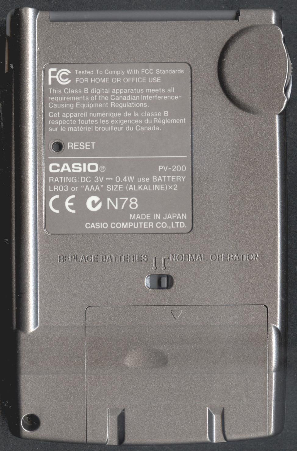 Casio PV-200 vista trasera